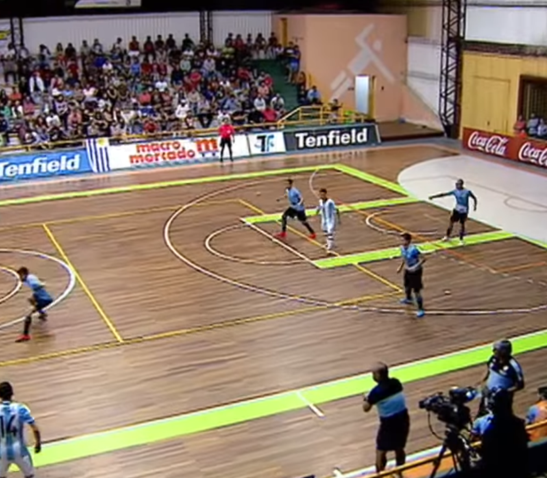 Estadio Ditaires Coliseo en un partido entre Uruguay y Argentina